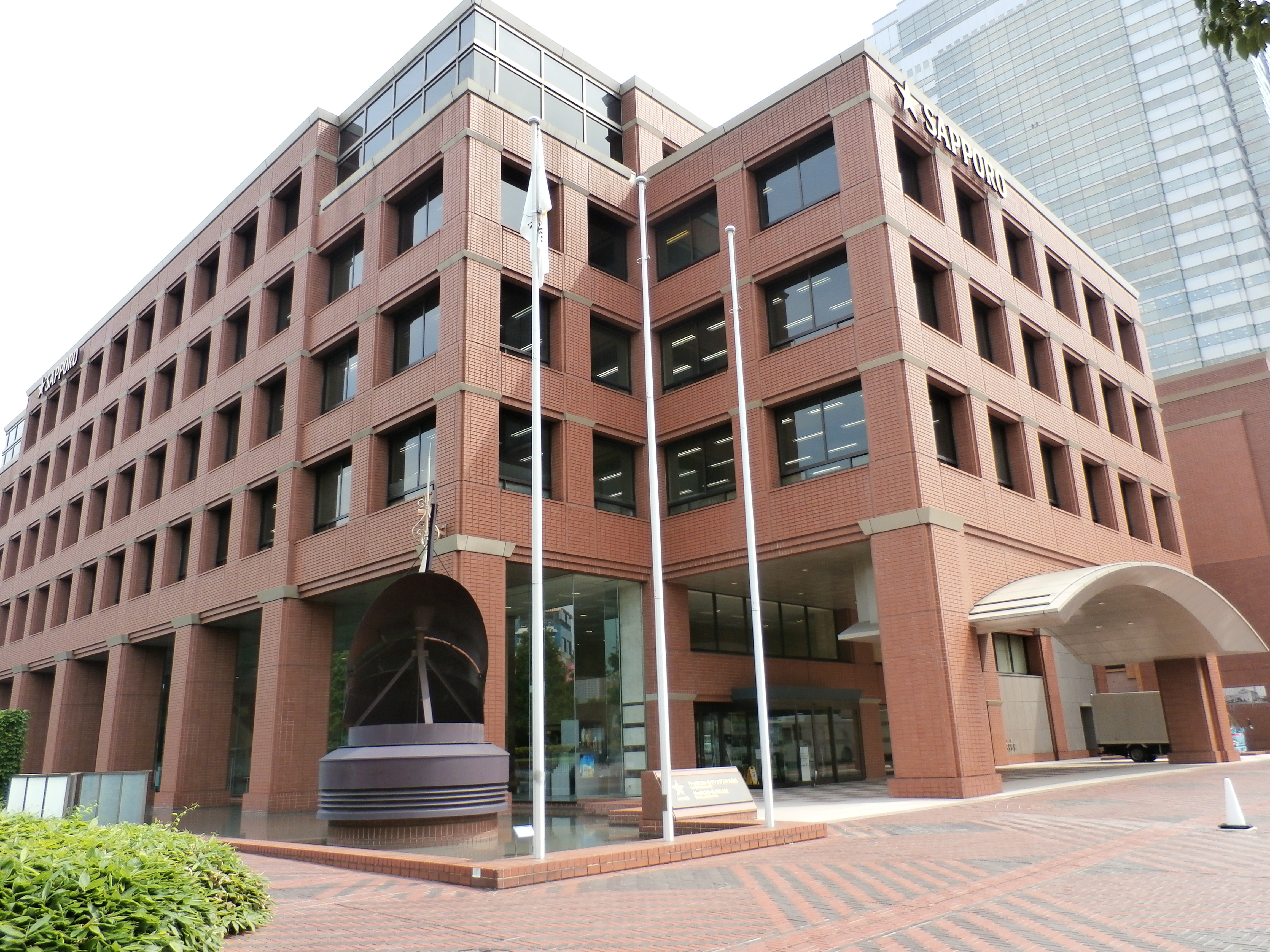 恵比寿ガーデンプレイスにあるサッポロホールディングス本社ビル